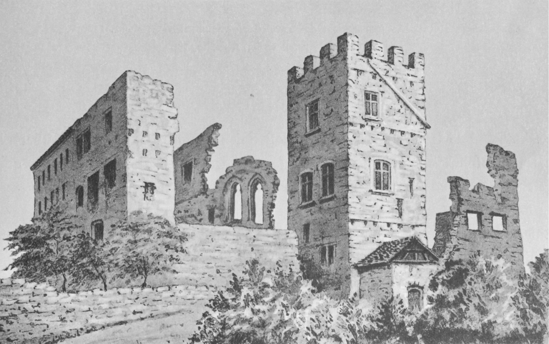 {Schloss Brandis Zeichnung von F. Küpfer, 1880